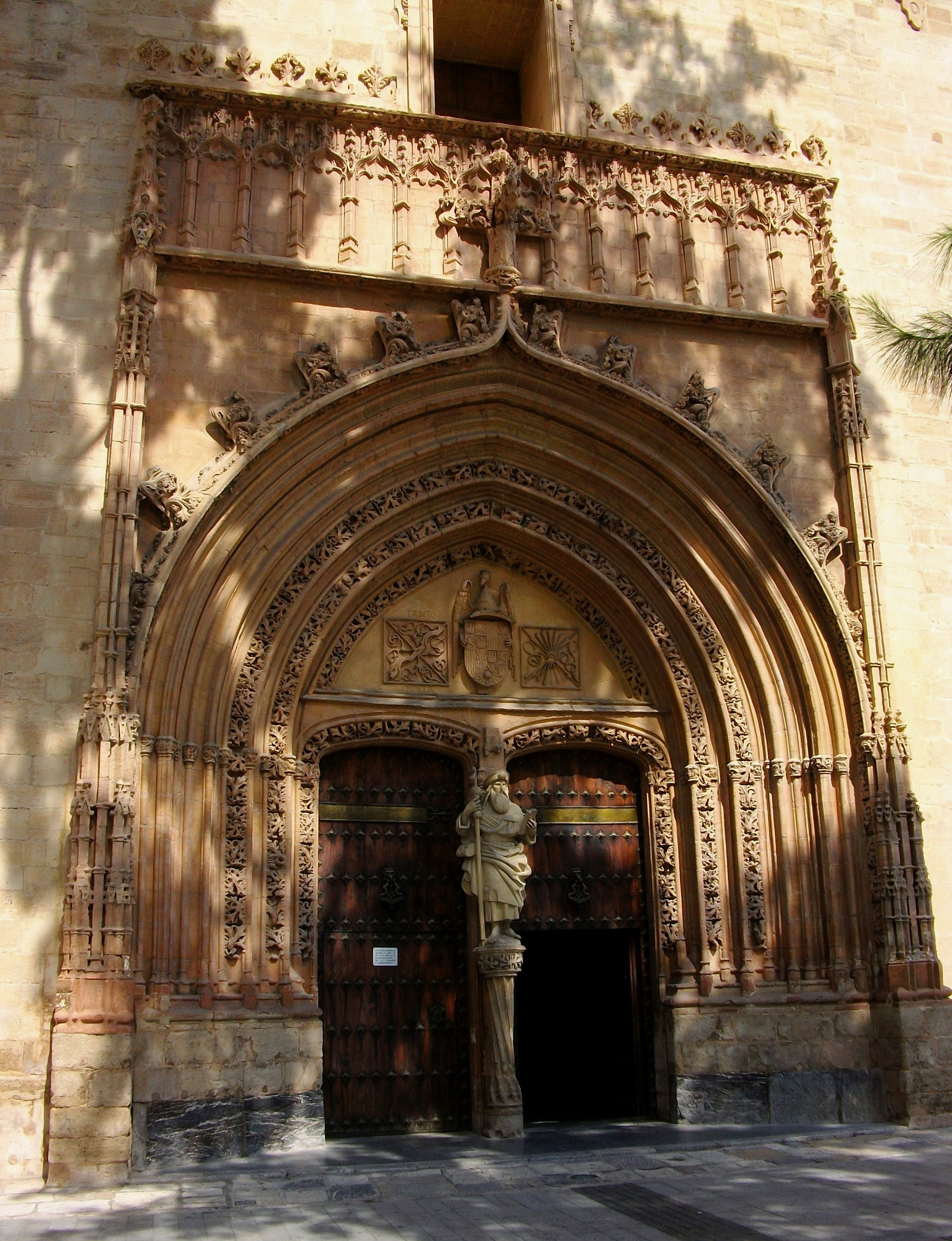 Oriola, portalada de l'església de sant Jaume.